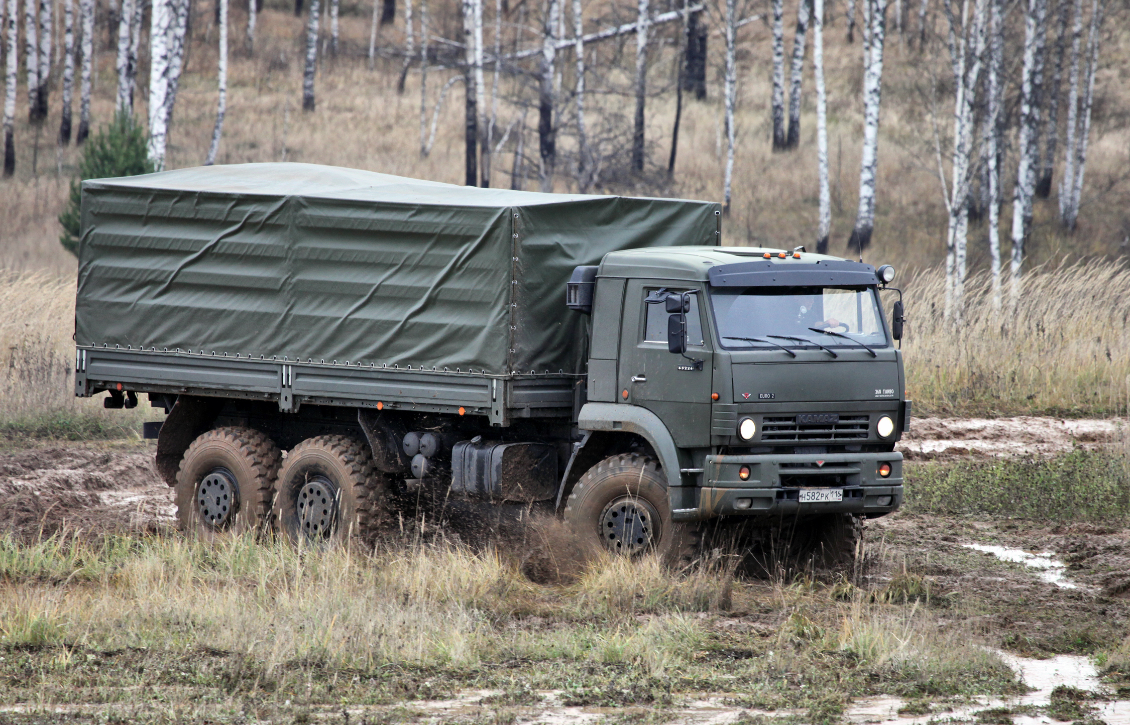 КАМАЗ-65224 (KAMAZ-65224)